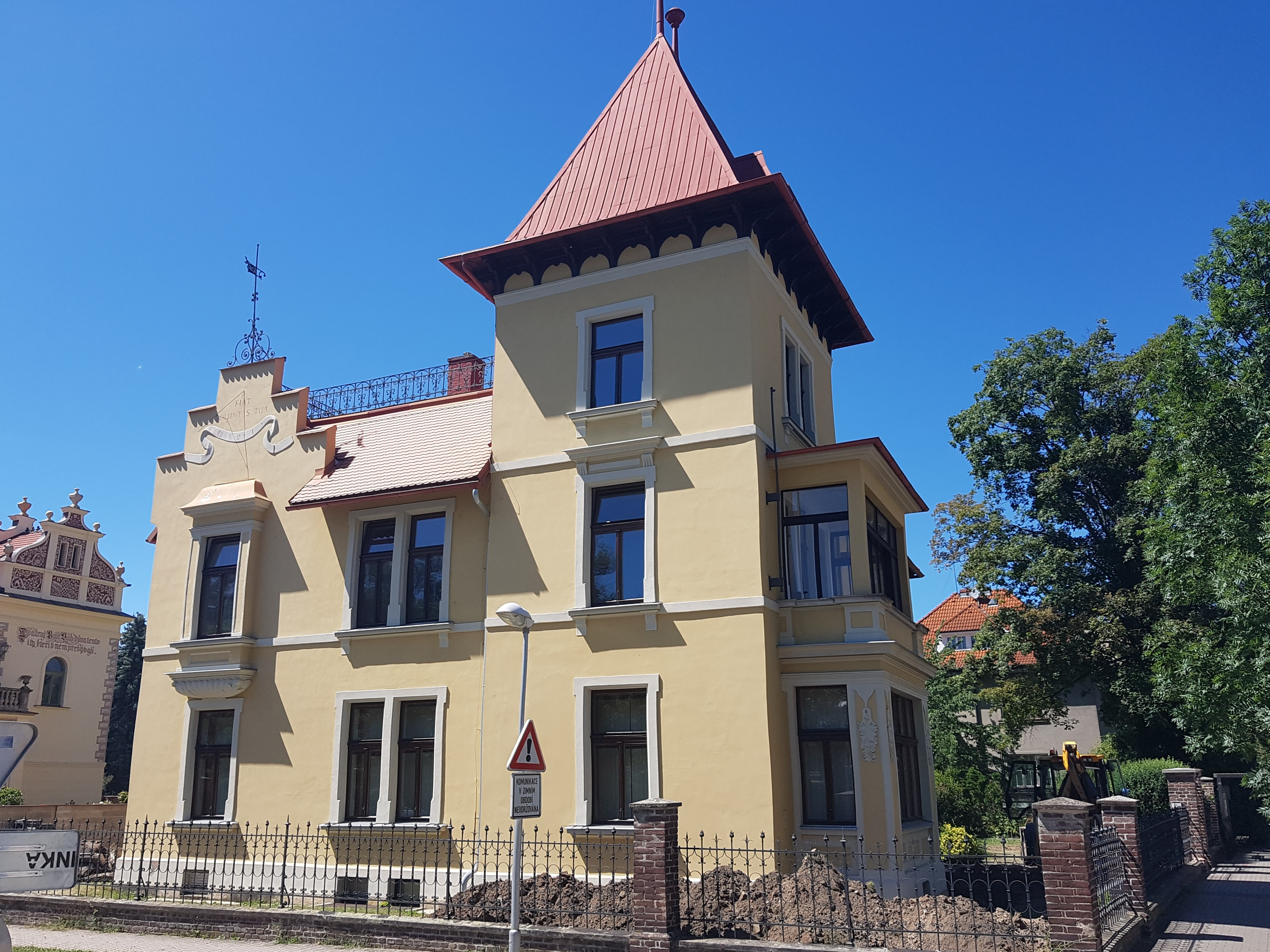 Vieweghova vila v Hradci Králové (2020)